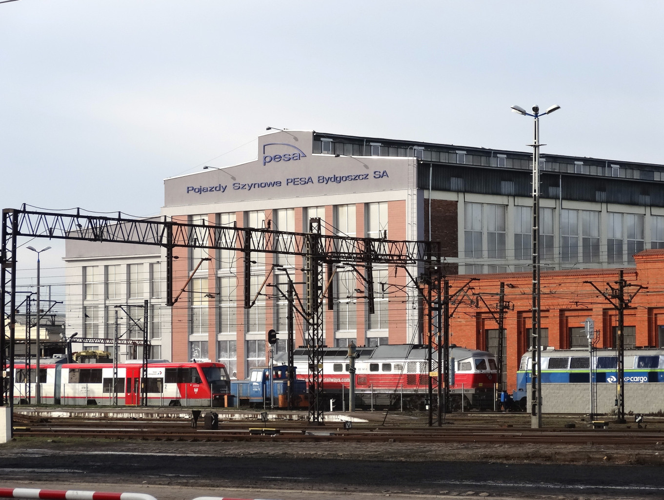 Hala montażowa zakładów Pojazdy Szynowe Pesa w Bydgoszczy. Widok od ul. Zygmunta Augusta